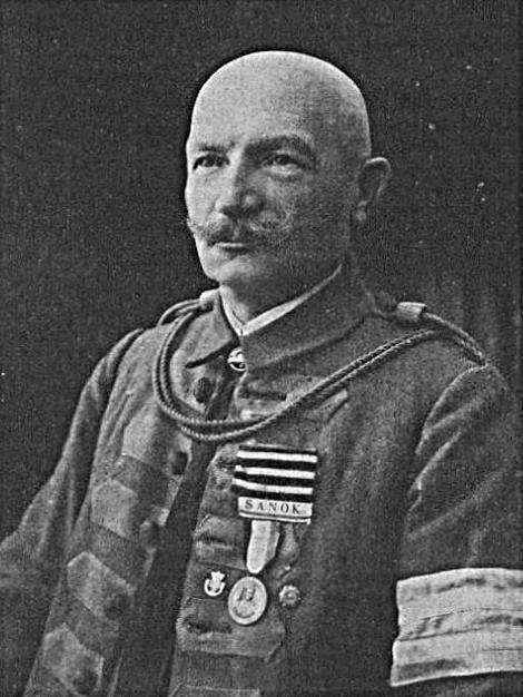 Marian Szajna (nauczyciel i działacz sokoli)